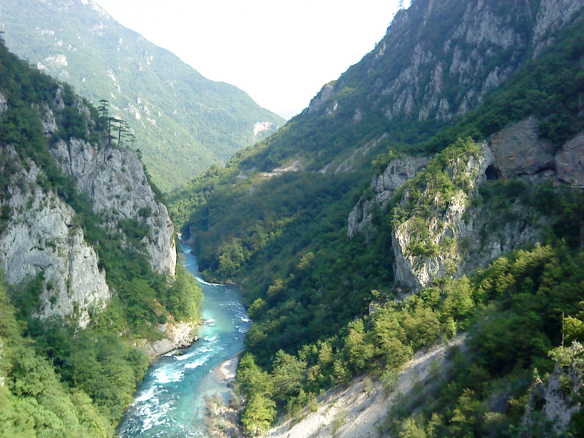 Der Piva-River in MontenegroDansk: Piva-River in Montenegro